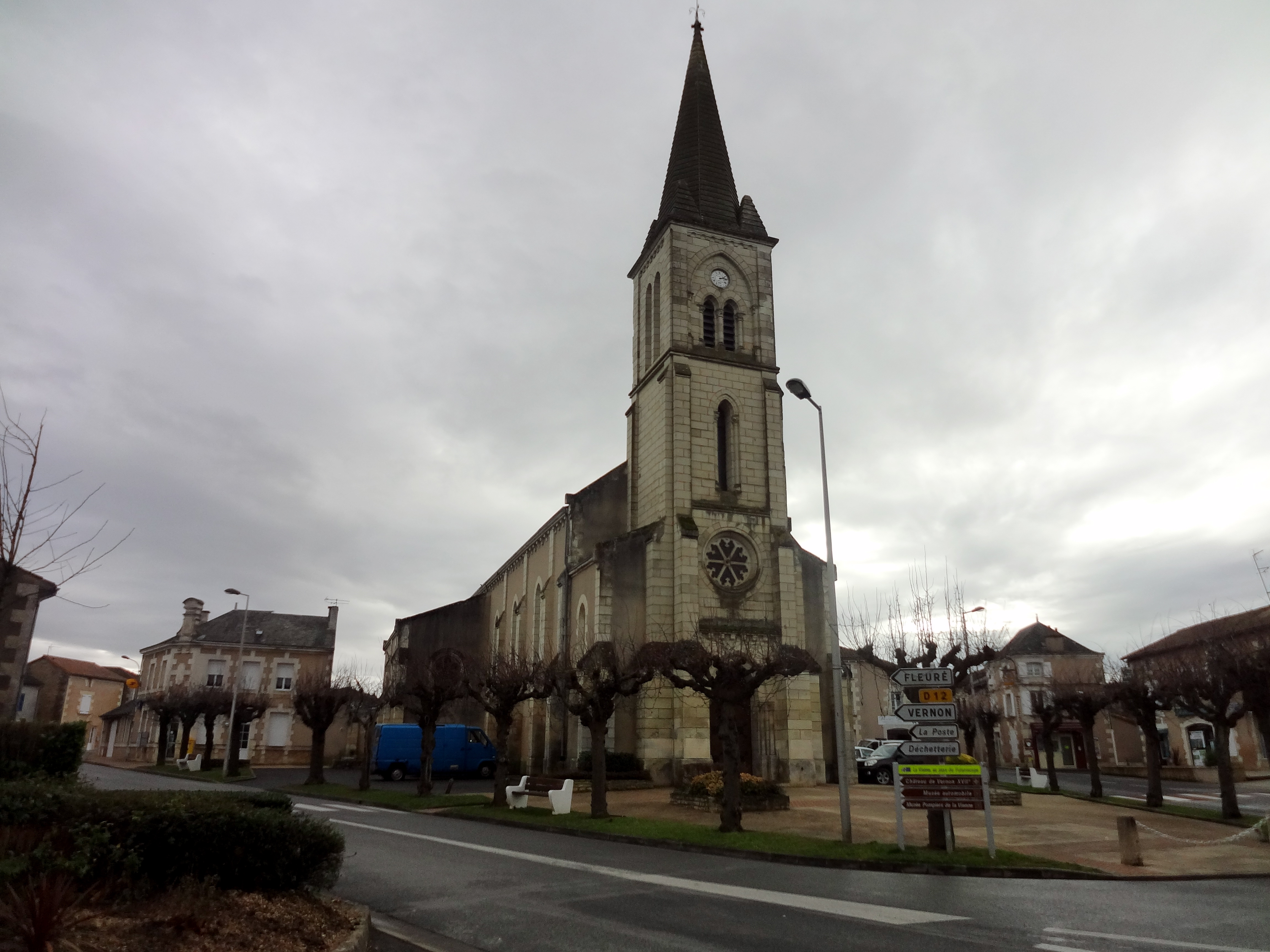 Façade principale de l'église Saint-Gervais et Saint-Protais de Nieuil-L'Espoir (86).